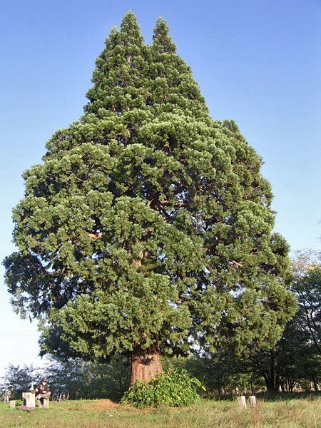 A mamutfenyő Jármytanyán Balkányban